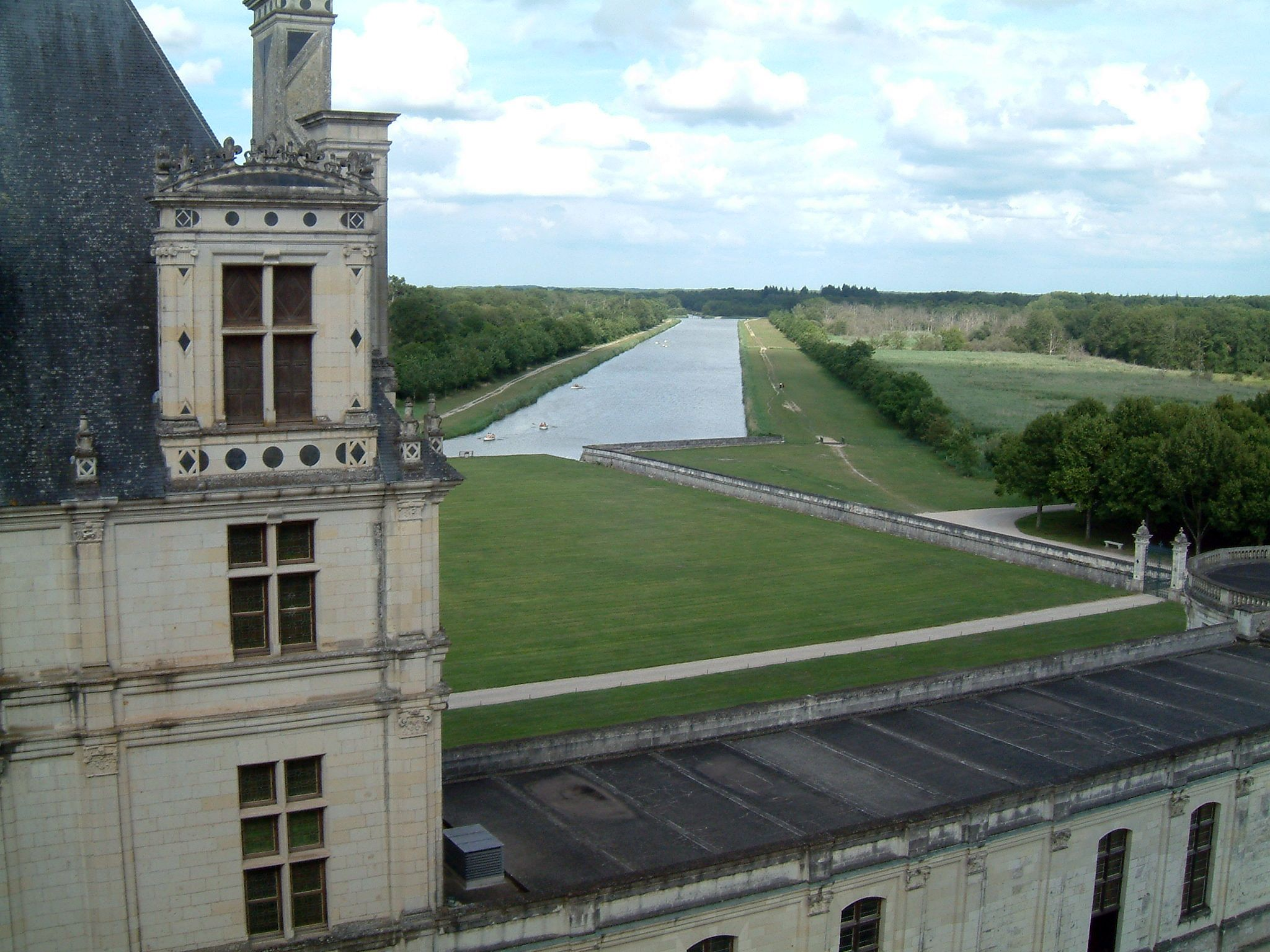 Vue du parc, Château de Chambord, Chambord, FRANCE